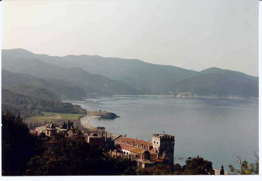 Αποχωρώντας απο το Βατοπἐδι.